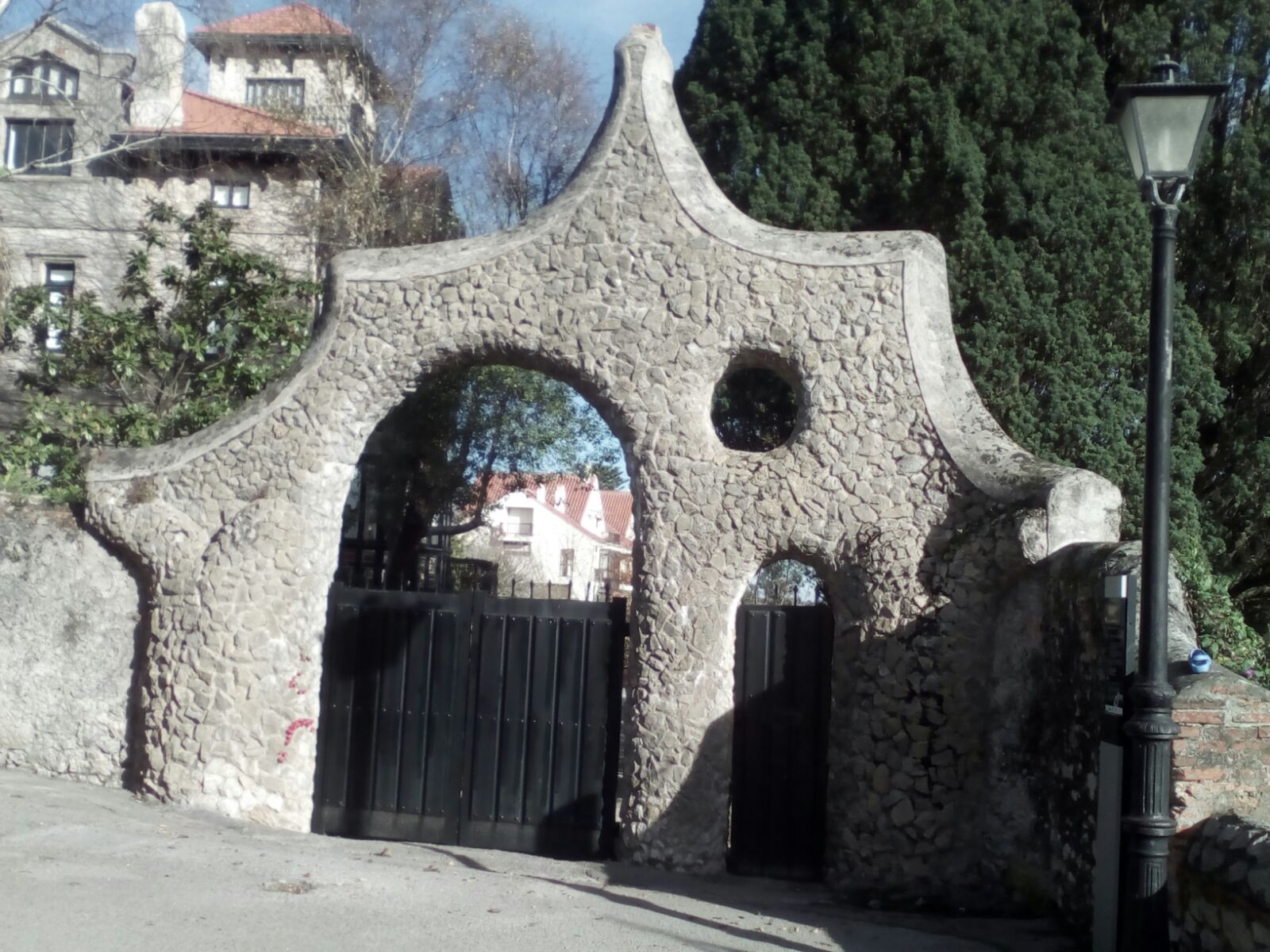 Puerta de los Pájaros o del Moro en Comillas (Cantabria, España).